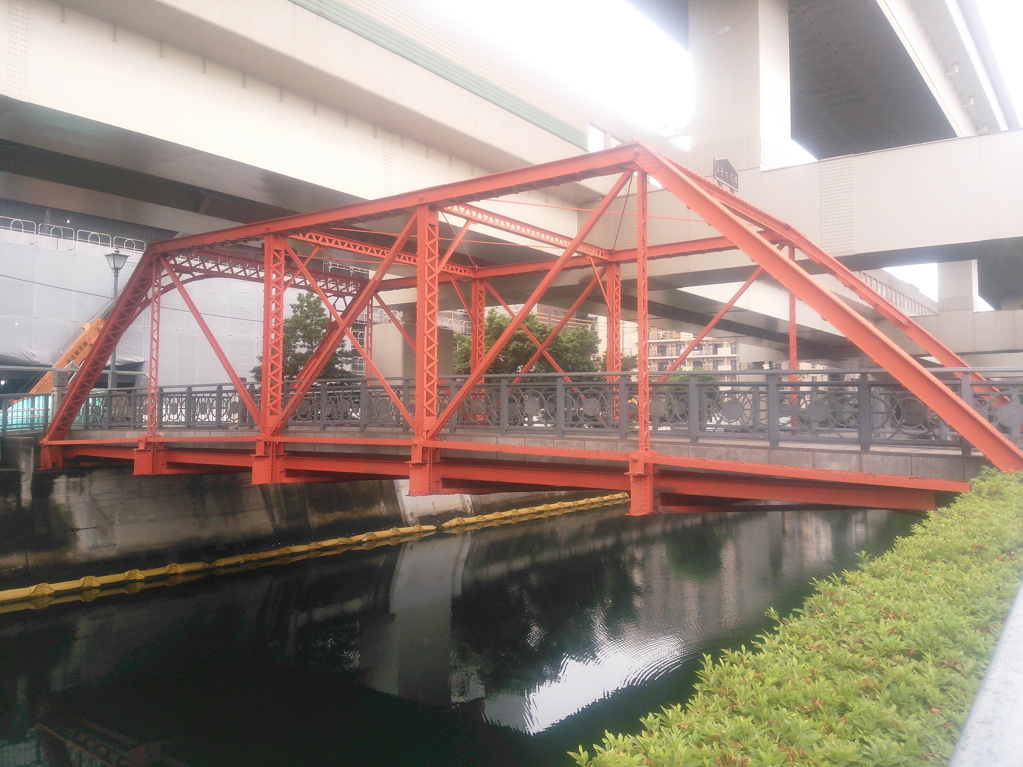 横浜市南区、浦舟水道橋